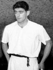 José María Palacios, Ogueta, in 1959